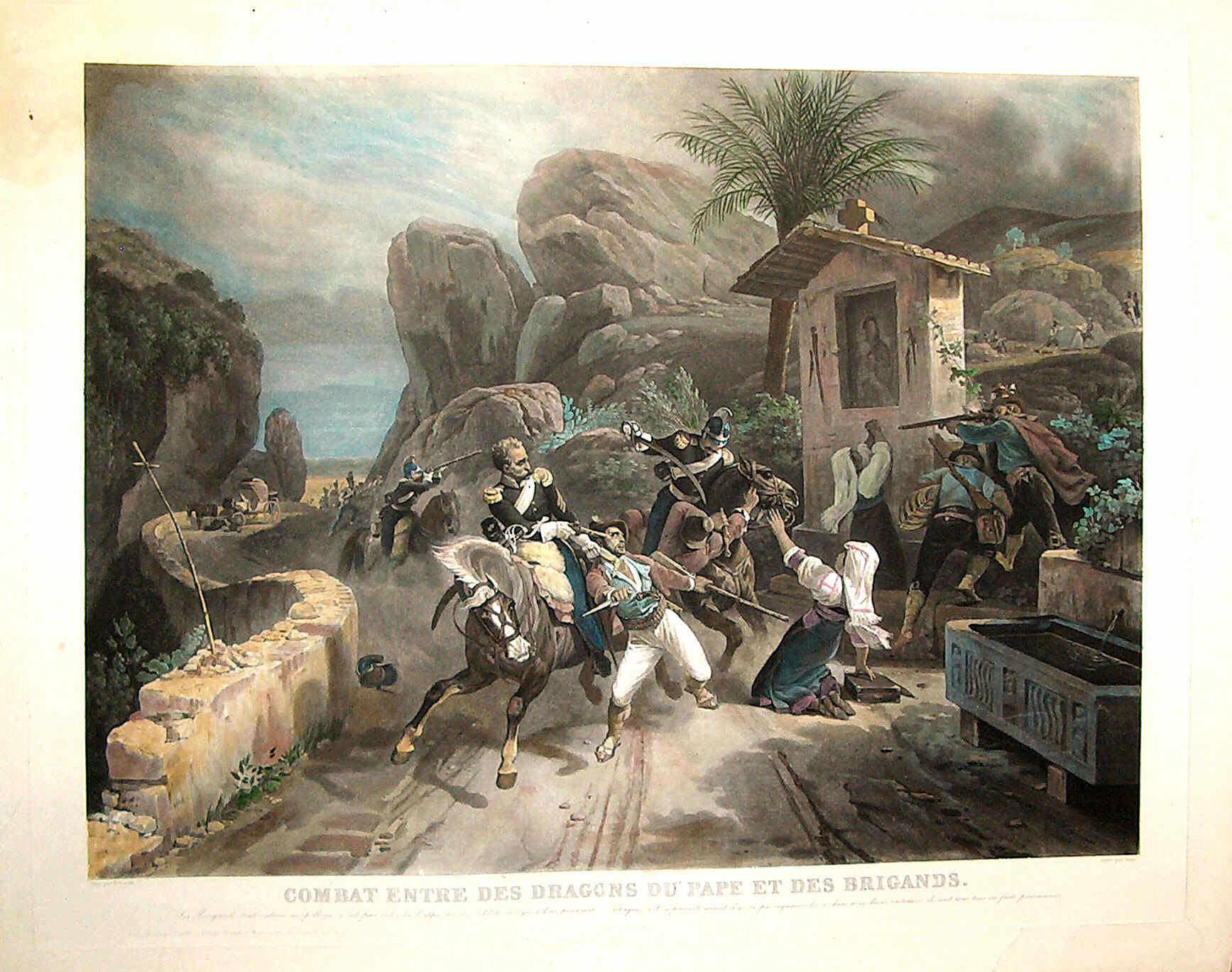 Riproduzione su stampa dell'epoca del dipinto di Horace Vernet